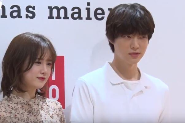 디스패치 구독 클릭!